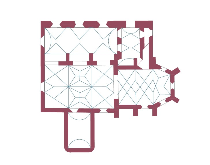 Půdorys kostela Božího Těla ve Slavonicích